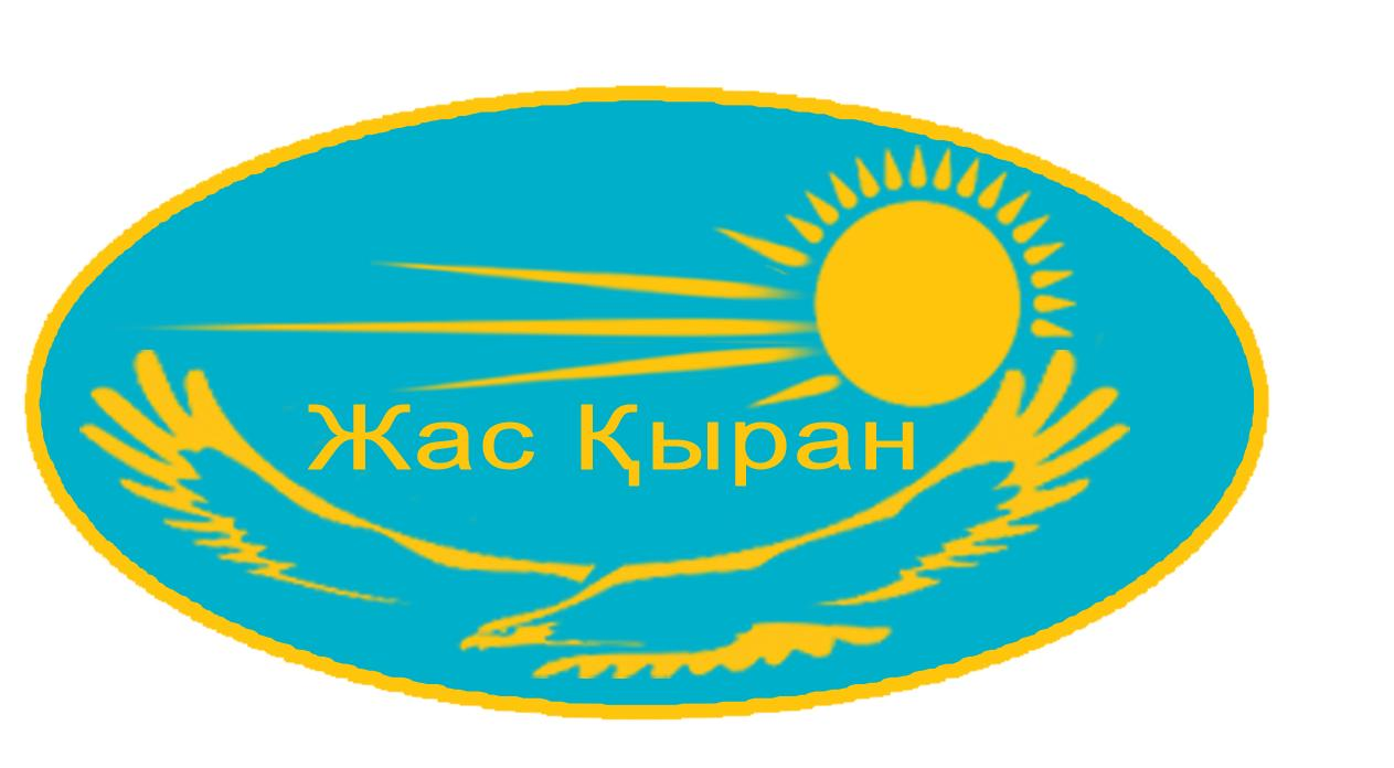 Жас қыран